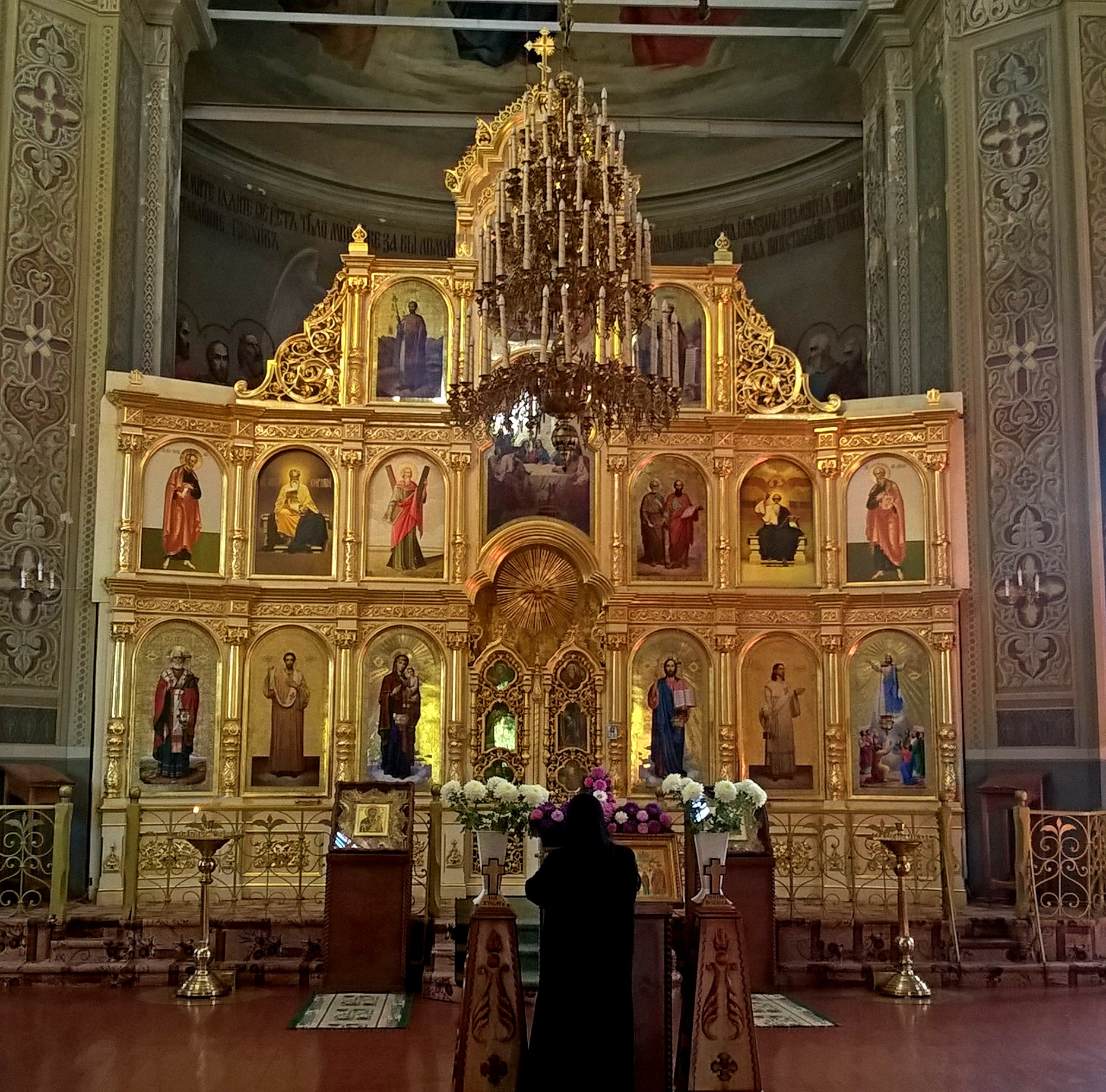 Ikonostas w cerkwi Wniebowstąpienia Pańskiego w monasterze Nowy Neamț